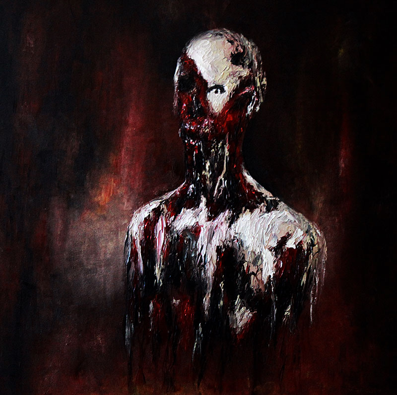 70x70 Öl auf Leinwand Gemälde 2017